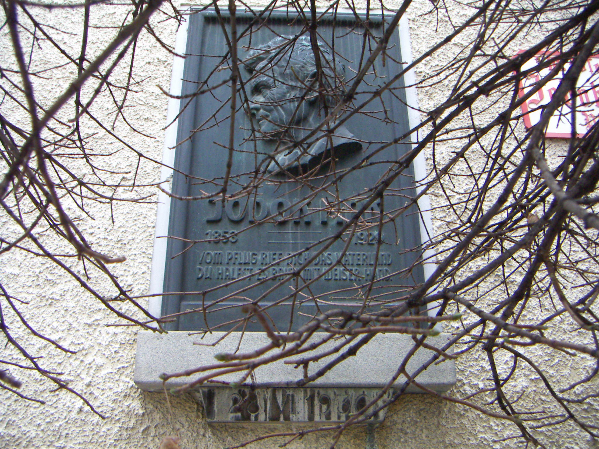 Jodok-Fink-Platz, Vienna